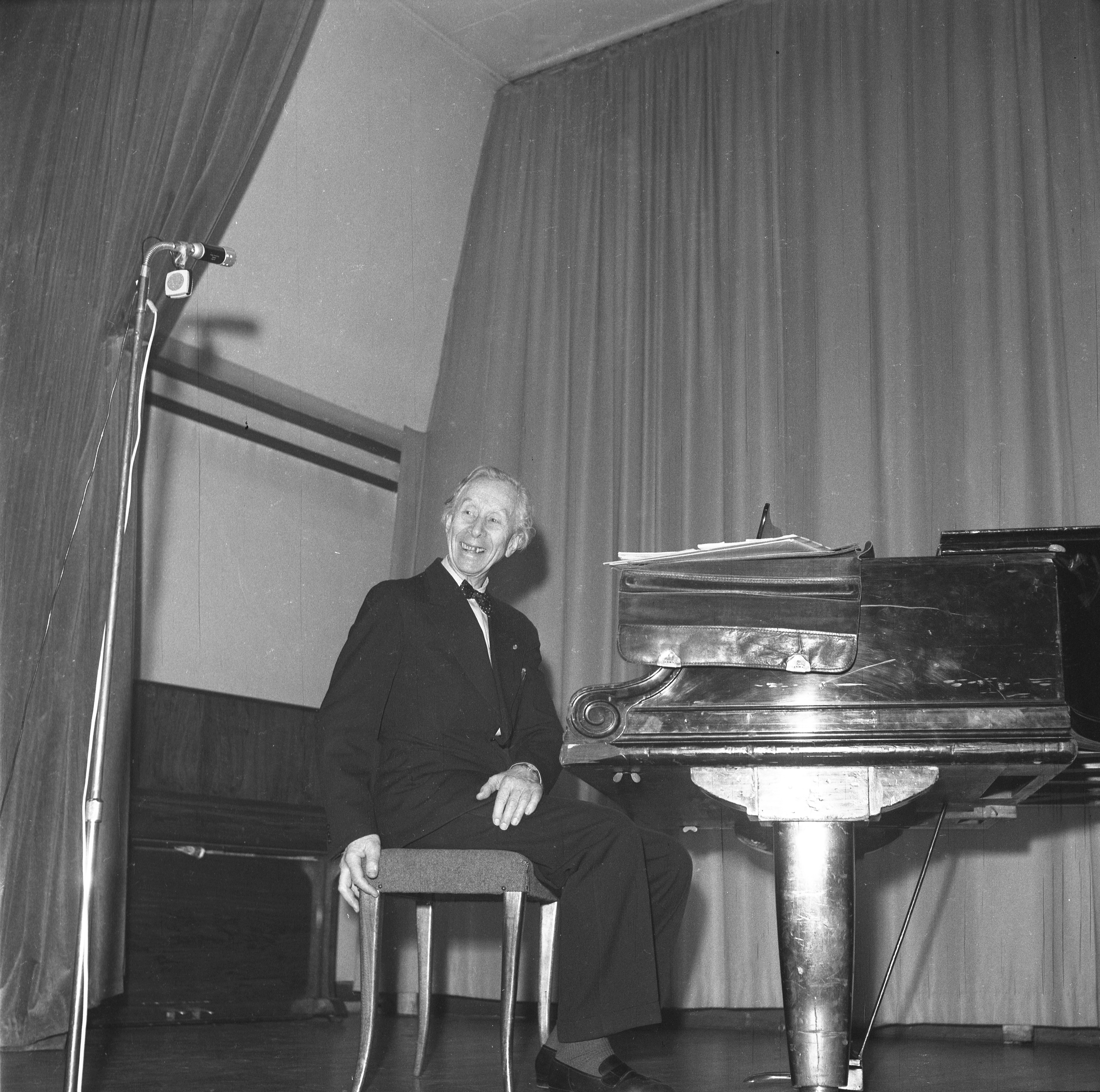 Format: Negativ 120 film Dato / Date: 17 April 1967 Fotograf / Photographer: Eirik Sundvor (1902 - 1992) Sted / Place: Studentersamfunnet i Bergen Wikipedia: Harald Sæverud (1897 - 1992) Hvem er hvem? (1973): Harald Sæverud (1897 - 1992) Eier / Owner Institution: Trondheim byarkiv, The Municipal Archives of Trondheim Arkivreferanse / Archive reference: Tor.H43.Bxx.F14203 Merknad: Komponist Harald Sæverud på 70-årsdagen i Studentersamfunnet. SÆVERUD Harald Sigurd Johan, komponist, Rådal, f. 17. april 1897 i Bergen, bror av ovenn. disp. Bjarne P. O. S. Gift 1934 Marie Hvoslef, f. 9. febr. 1900, dtr. av skipskapt., senere skipsmegler i New York Frederik Waldemar H. (1861-1926) og Madsella Lorenze Steen (1873-1955). Middelsk., 2 år gymn., Bergens Musikakad. 1915-20, Staatl. Hochschule für Musik, Berlin 1920-21, dirigentkurs Clement Krauss 1935. Komponist. Skr. 9 symfonier, den syvende (salme) med orgel, 50 orkestervariasjoner, Canto ostinato, Lucretia-suite, Gjetlevisevar., fiolinromanse, symfoniske danser, obokonsert, klaverkonsert, Kjempeviseslåtten, scenemusikk til Peer Gynt, alle for ork., og en rekke verker for klaver, bl.a. Slåtter og stev fra Siljustøl. Dessuten musikk til filmen Havretunet, 6 sonatiner for klaver, 20 små fiolinduetter, fiolinkonsert, Vade Mors, Allegria ork., Minnesota Symphony (efter best. av staten Minnesota ved 100-års jub.), Fagottkonsert, balletten Ridder Blåskjeggs mareridt, festmusikk til Håkonhallens gjenåpning. Fugle-fløyt-variasjoner, klaver, Strykekvartett, Fanfare og hymne, Sonata ginbilata, Entrata regale, Mozart-motto-sinfonietta. Statens kunstnerlønn siden 1955. Form. Kunstnersamf. i Bergen 1930-31, styremedl. Norsk Komp.for. 1946-48. Styremedl. Harmonien fra 1955, form. 1961-64, æresmedl. 1957. Varaordf. Tono 1954, medl. Kgl. Svenska Musikaliska Akad. 1952, U. N. Hon. Music Panel, New York 1953. Æresmedl. Finlands komponistfor., Kunstnersamf. i Bergen. R.1 St. O. O. (1957). [Fra Hvem er hvem? 1973]